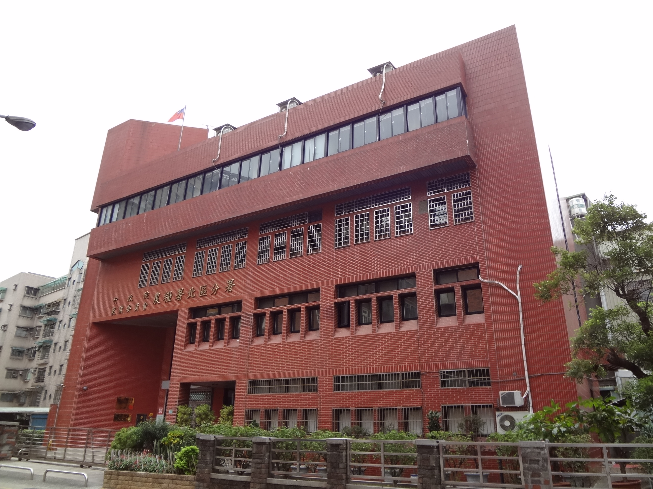 行政院農業委員會農糧署北區分署，地址：桃園縣桃園市大同路111號（原臺灣省政府糧食局桃園管理處大樓）。